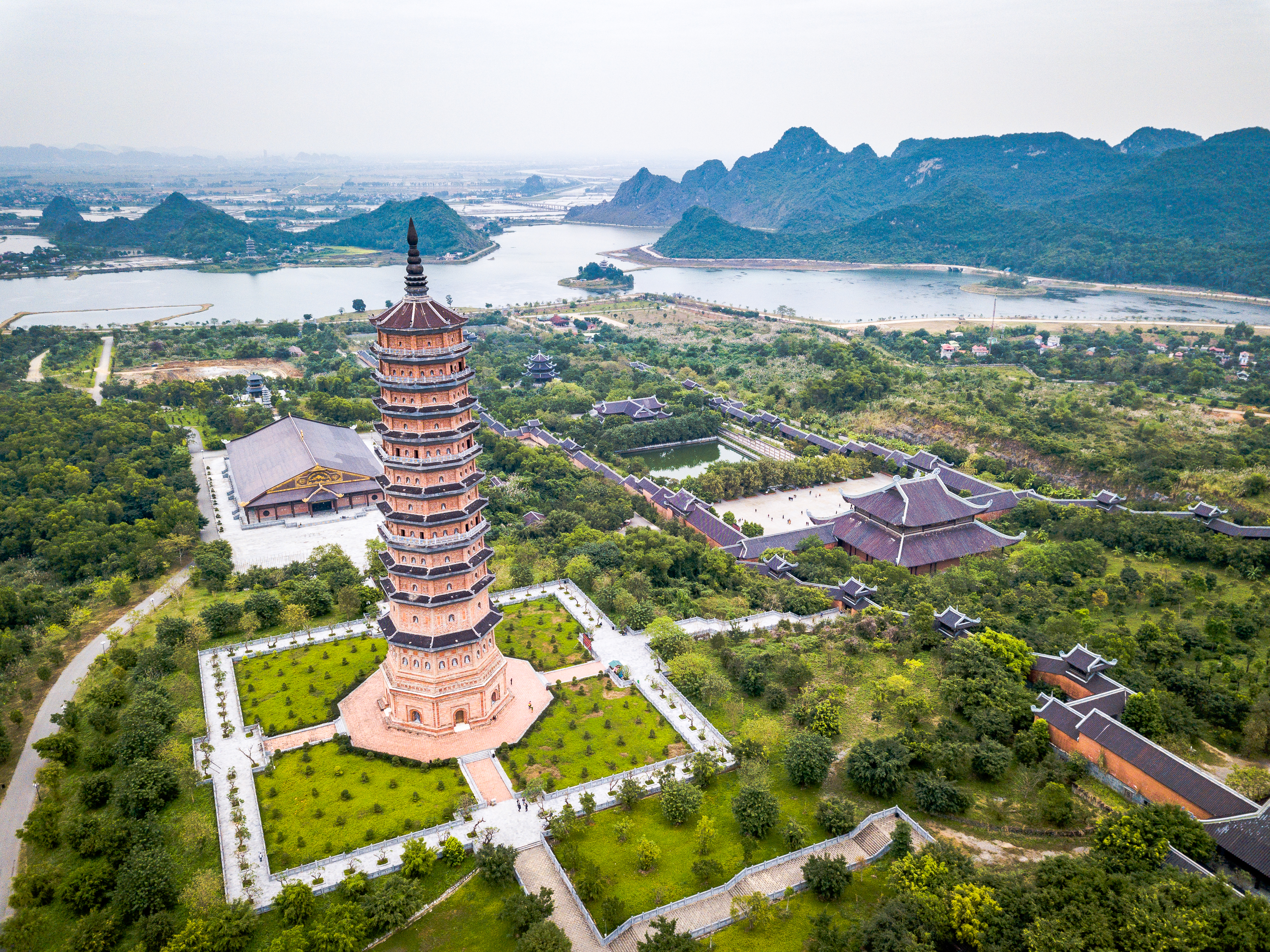 Photos de Ninh Binh vue du ciel